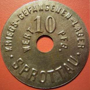 Jedna z monet obozowych, 10 Pfg.